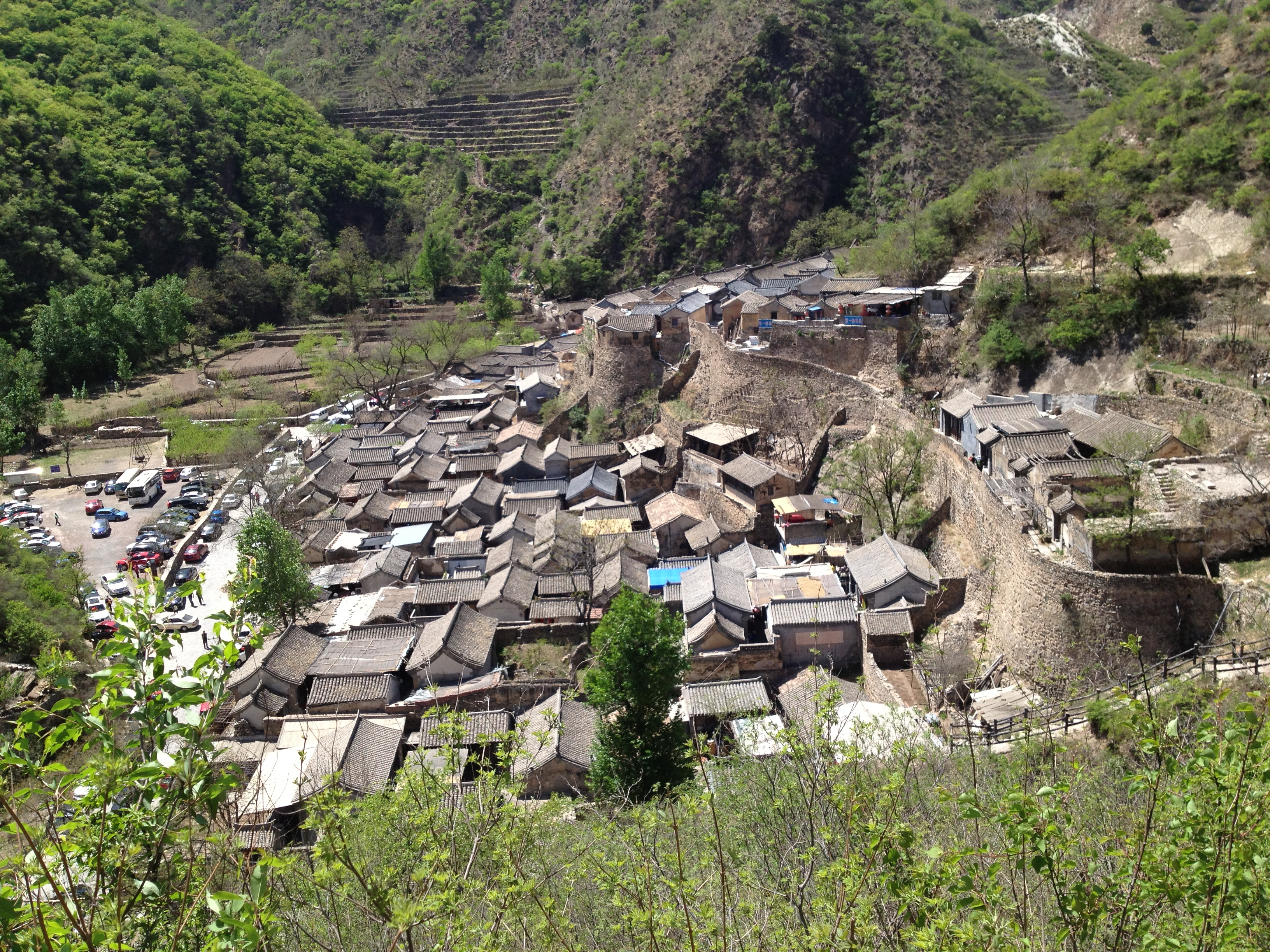 中文（中国大陆）: 北京西郊门头沟区斋堂镇爨底下村